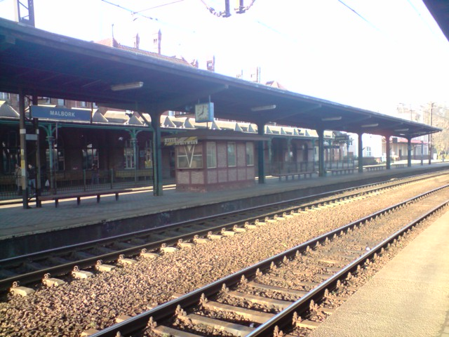 Peron w Malborku